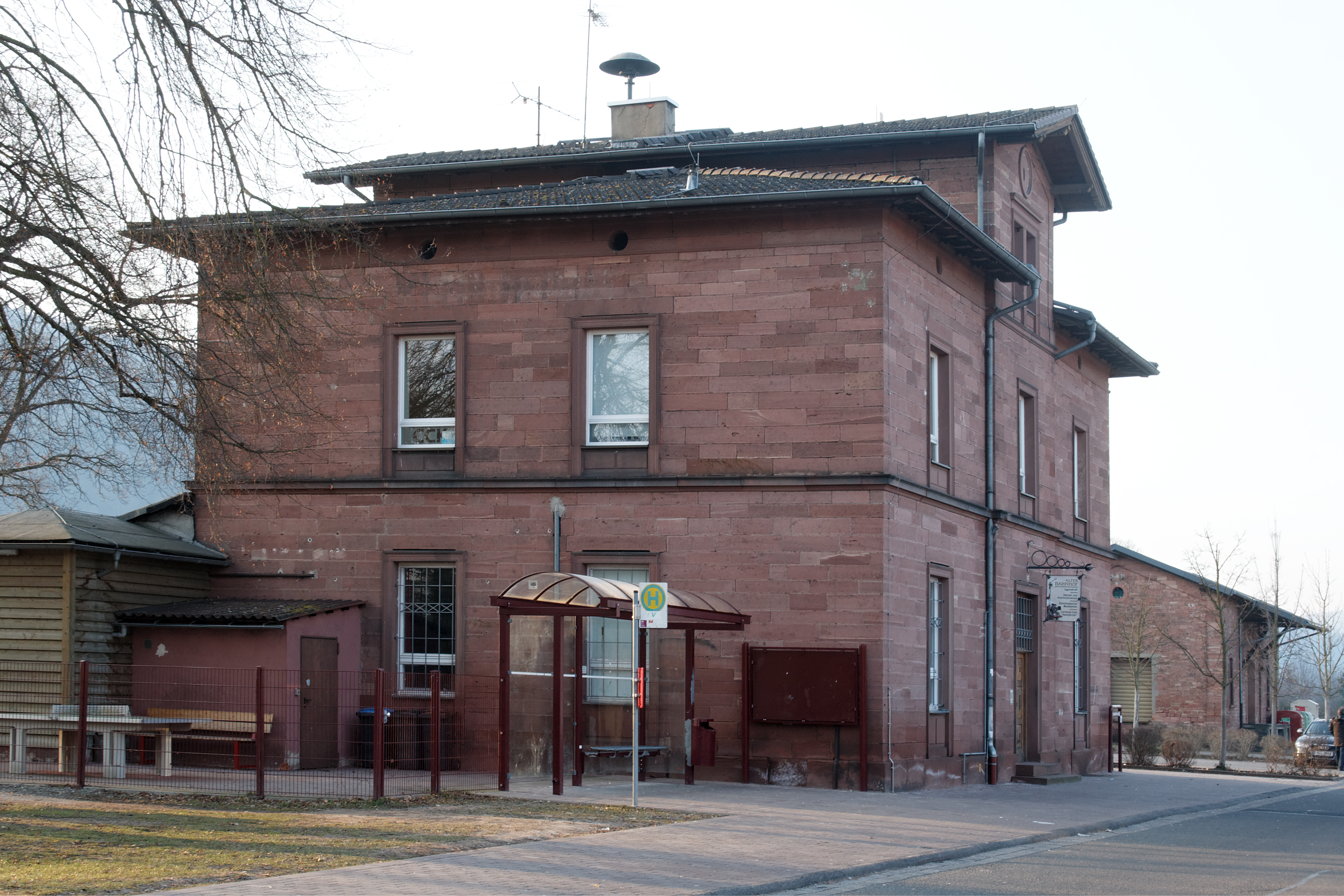 Ehemaliges Stationsgebäude des Bahnhofs Kleinheubach (Bayern), jetzt als Jugendtreff und Haus der Vereine genutzt.